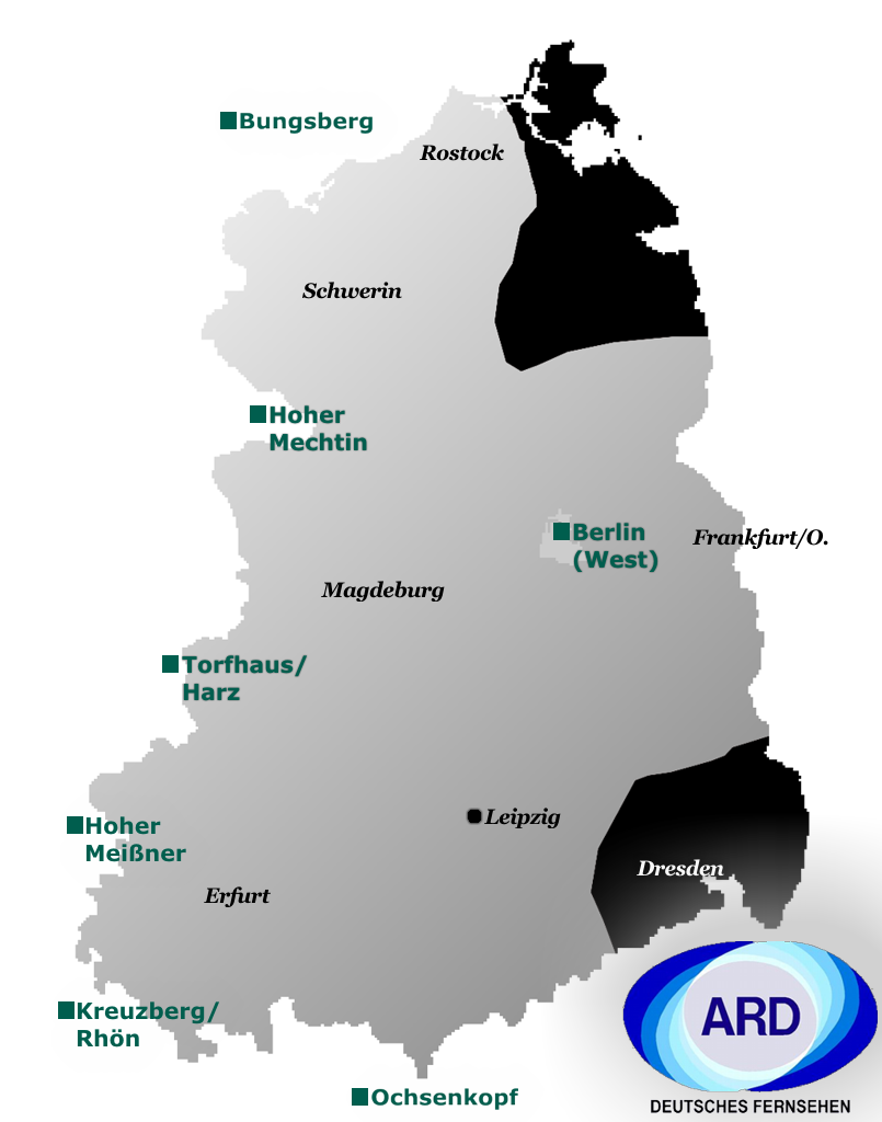 Ungefähre (!!) Reichweite der ARD in das Gebiet der DDR mit Senderstandorten.